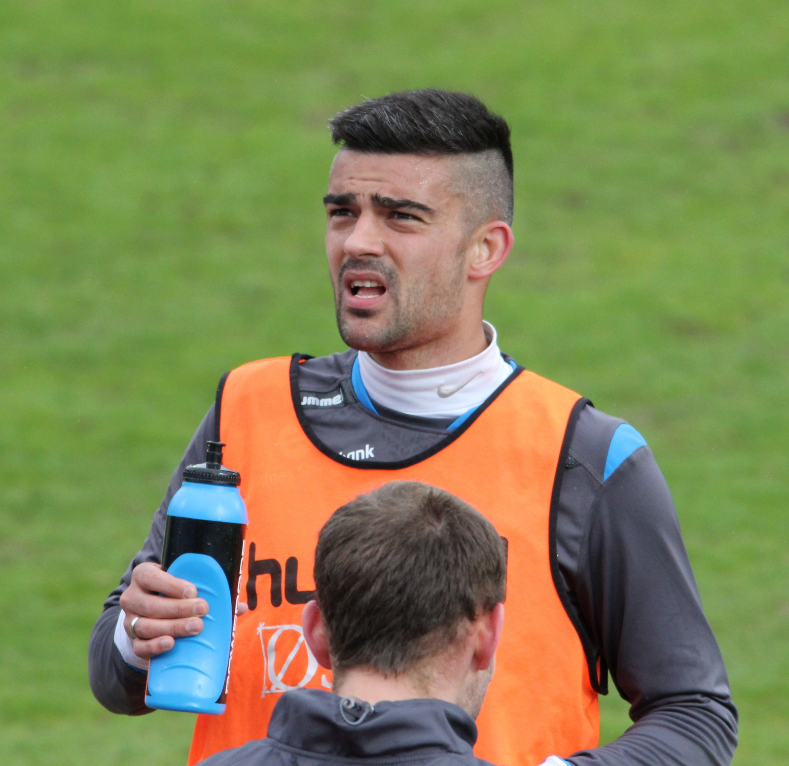 Miloš Mihajlov på Sandnes Stadion i kampen mellom Sandnes ULF mot Molde